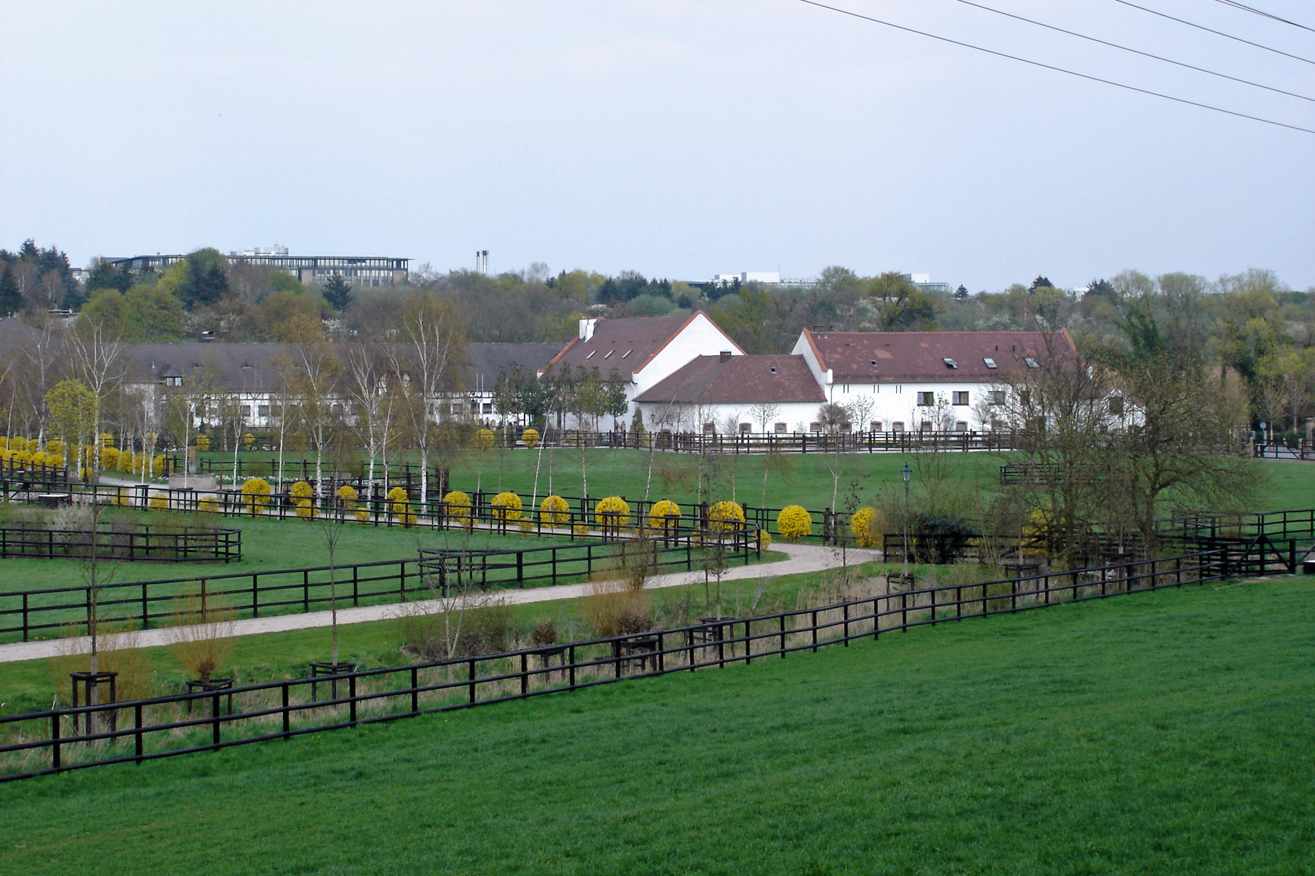 Gestüt "Schafhof" im Krontal